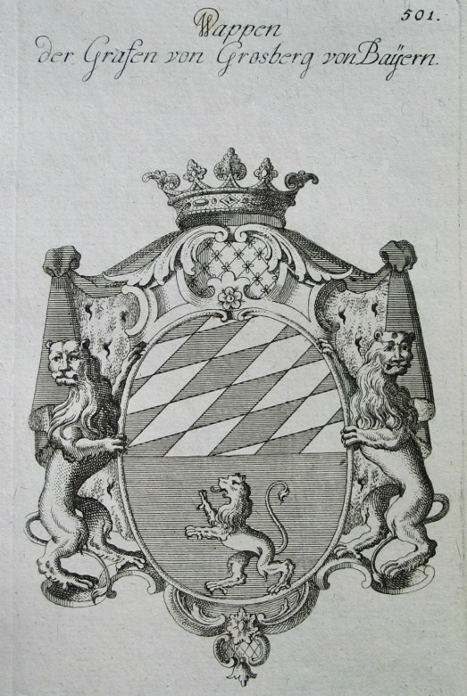 Wappen der Grafen von Grosberg von Bayern, Comte Jean Baptiste Victor de Grosberg-Bavière (1706–1768) und Comtesse Antoine Levin de Grosberg-Bavière (1710–1757), Kindern des Kurfürsten und Erzbischofs von Köln, Joseph Clemens von Bayern, und der Konstanze de Grousselier